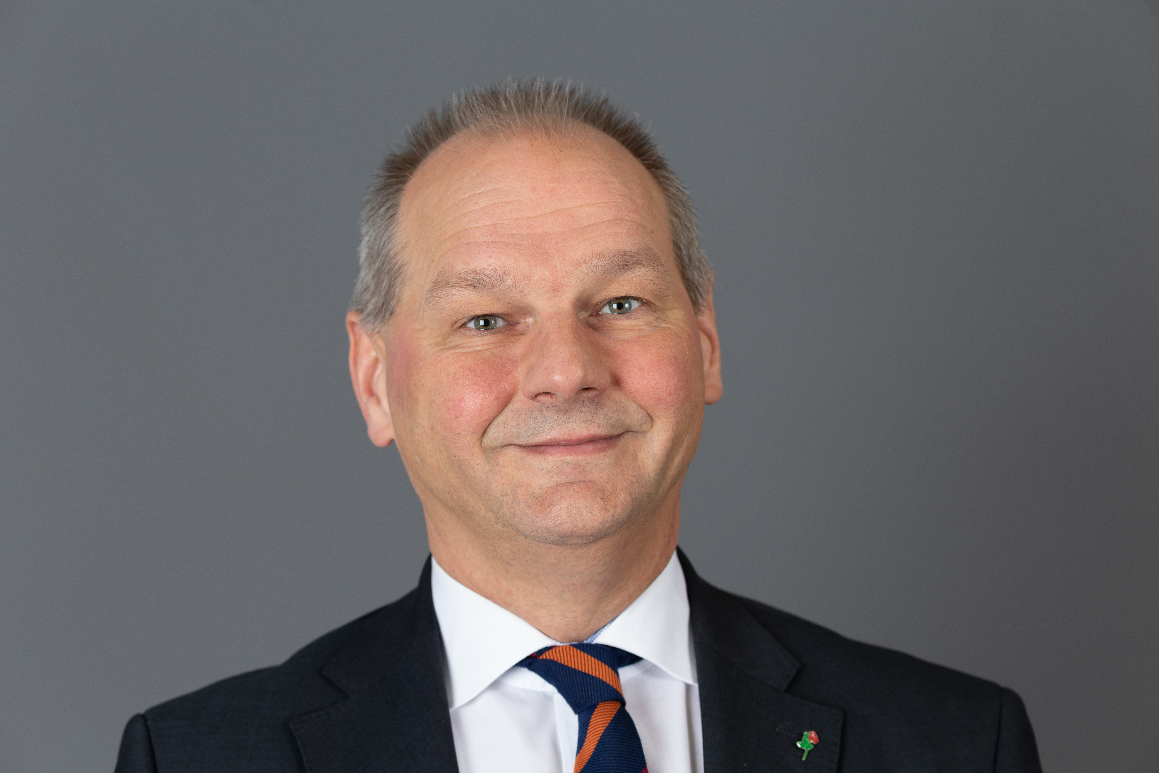 Deutscher Bundestag; Mathias Stein, SPD